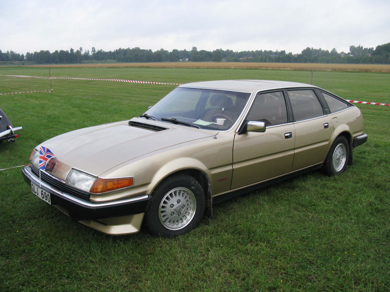 Rover 3500 SD1